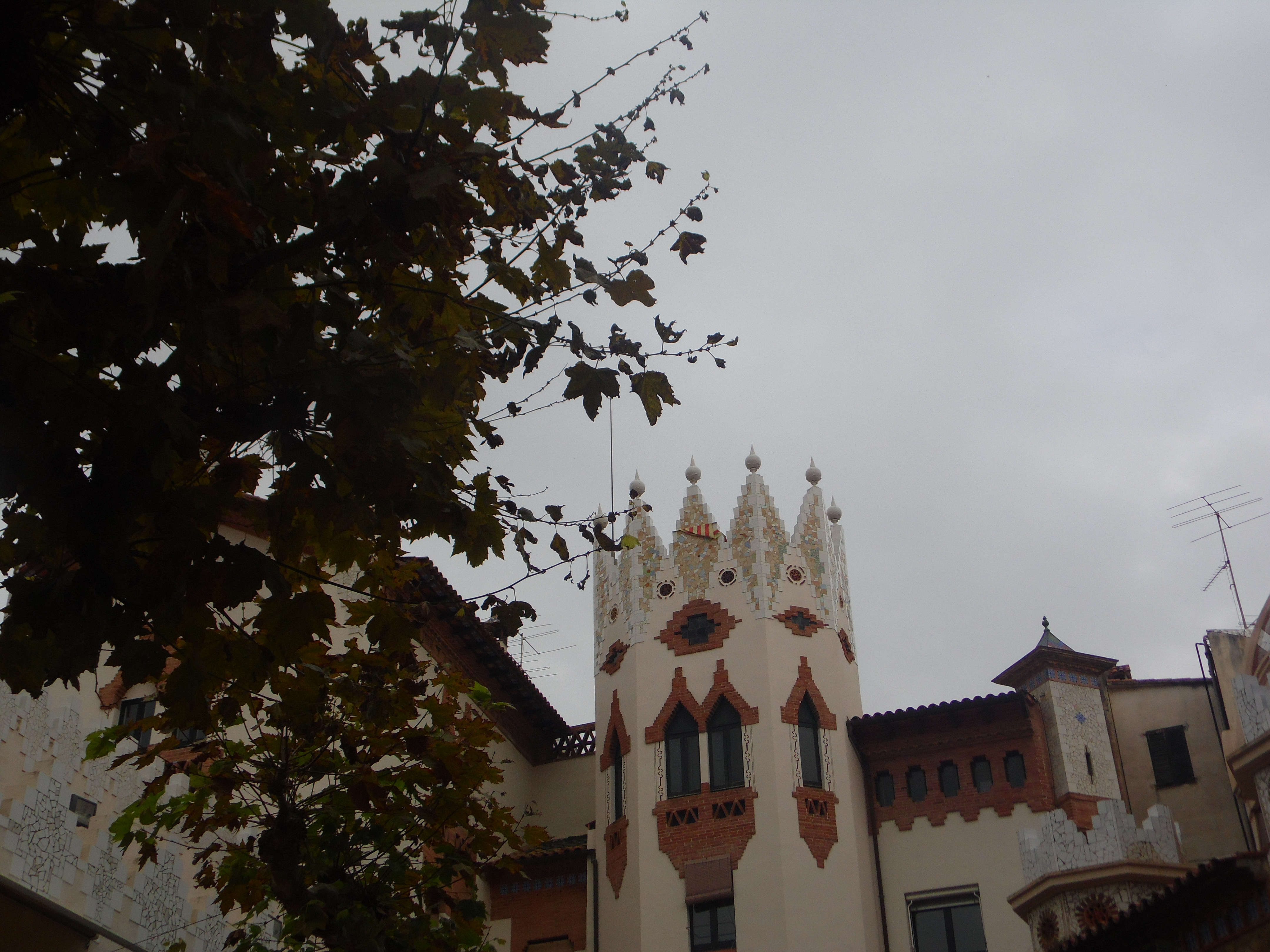 Rectoria (Lloret de Mar)